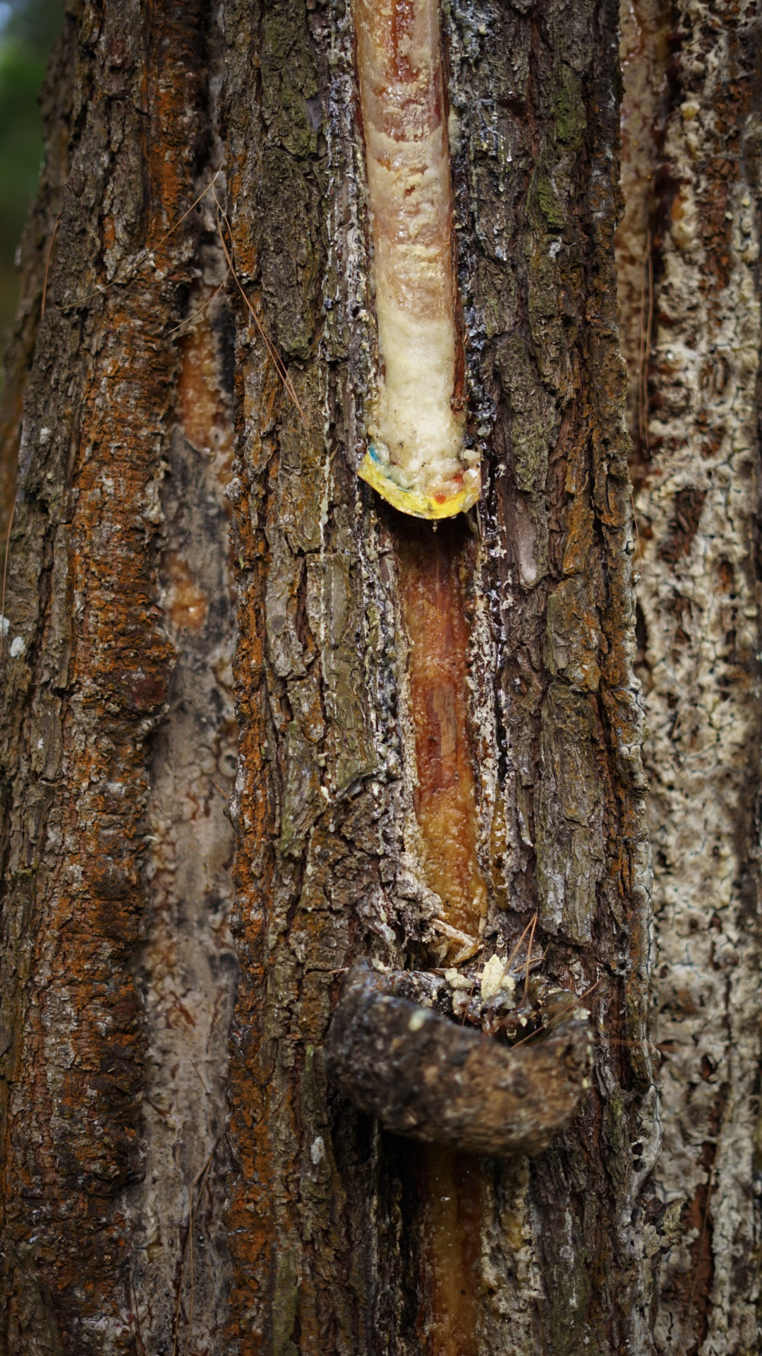 Sedikit gambaran umum tentang pohon pinus, ia termasuk pohon yang rindang dan mempunyai banyak manfaat buat manusia sebagai obat. Pohon ini banyak dijumpai di daerah yang berbukit dan pegunungan, sekarang ini sudah bisa ditanam sebagai pohon industri. Pohon kayu yang satu ini biasa kita lihat di daerah pegunungan ternyata menghasilkan manfaat getah dan kayu pohon pinus yang memiliki banyak kegunaan di masyarakat. Hasil dari getah pinus itu bisa menghasilkan minyak terpenting yang mengandung senyawa terpene yakni salah satu isomerhidrokarbon tak jenuh dari C10H163 terutama monoterpence alfa-pinene dan beta-pinene, terpenting biasanya digunakan sebagai pelarut untuk mengencerkan cat minyak sebagai bahan campuran vernis yang biasa kita gunakan untuk mengkilapkan permukaan kayu dan bisa untuk bahan baku kimia lainnya.